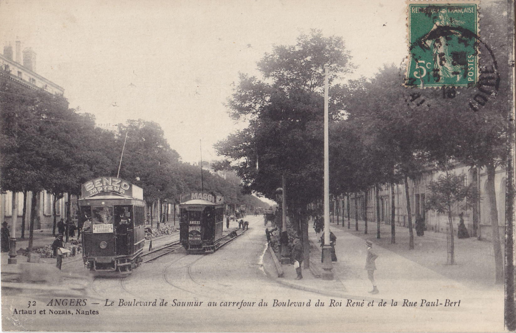 Carte postale ancienne éditée par Artaud_&_Nozais, éditeurs à Nantes, n°32 :ANGERS - Le Boulevard de Saumur au Carrefour du Roi René et de la Rue Paul-Bert